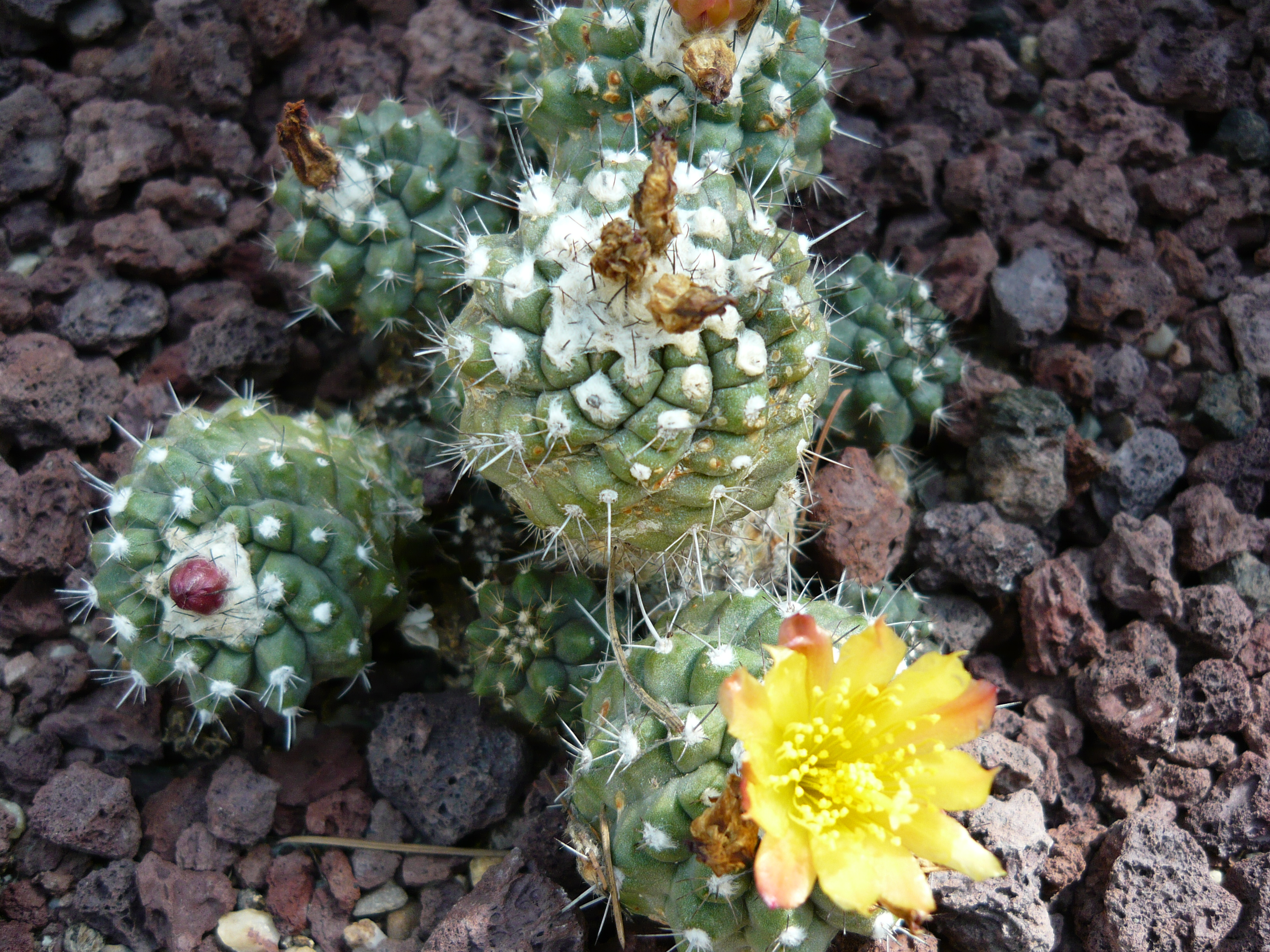 Copiapoa humilis. Real Jardín Botánico de Madrid.